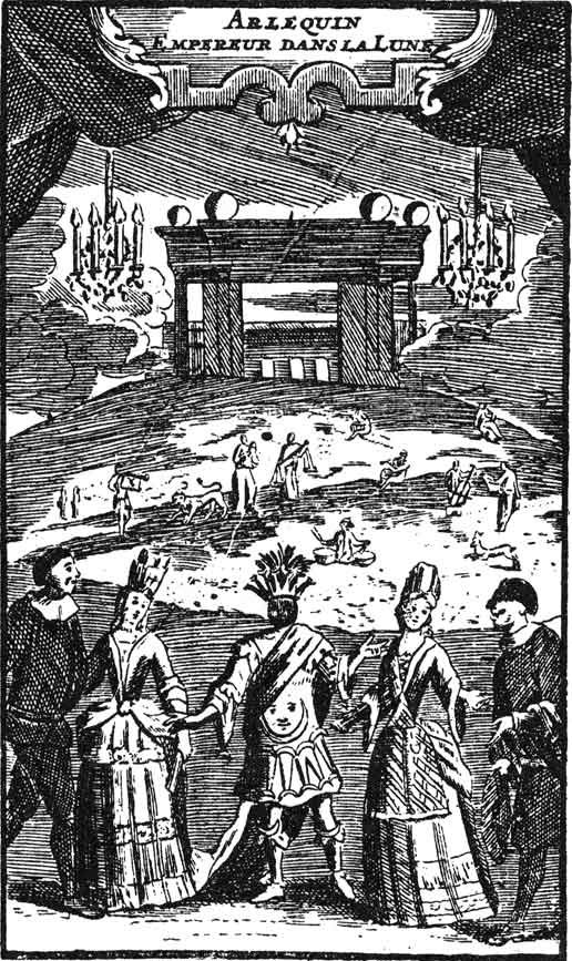 Illustration of Anne Mauduit de Fatouville's Arlequin empereur dans la lune